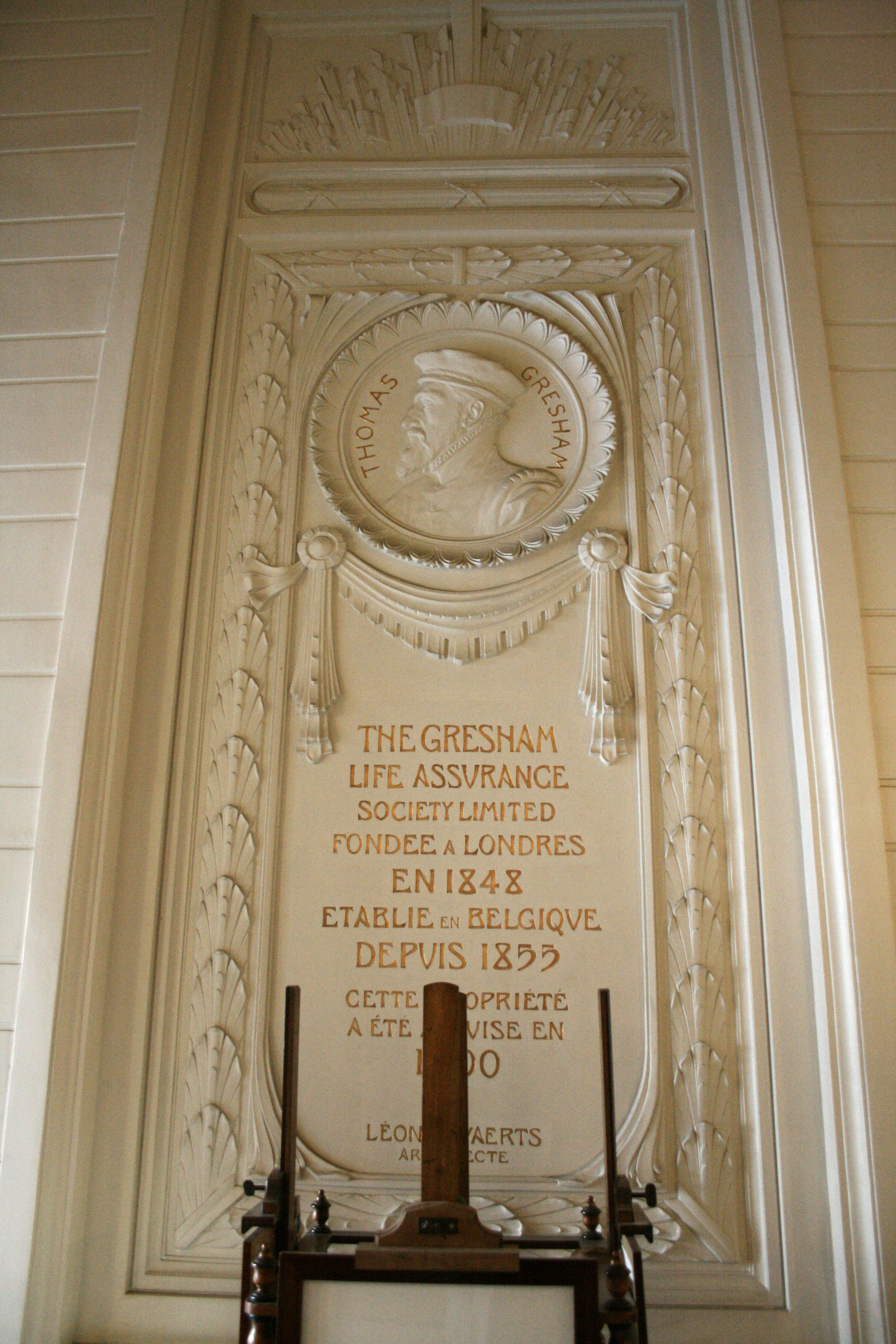 Place Royale 3, Bruxelles (Belgique). Bâtiment connu sous le nom "Hôtel Gresham". Intérieur Art Nouveau